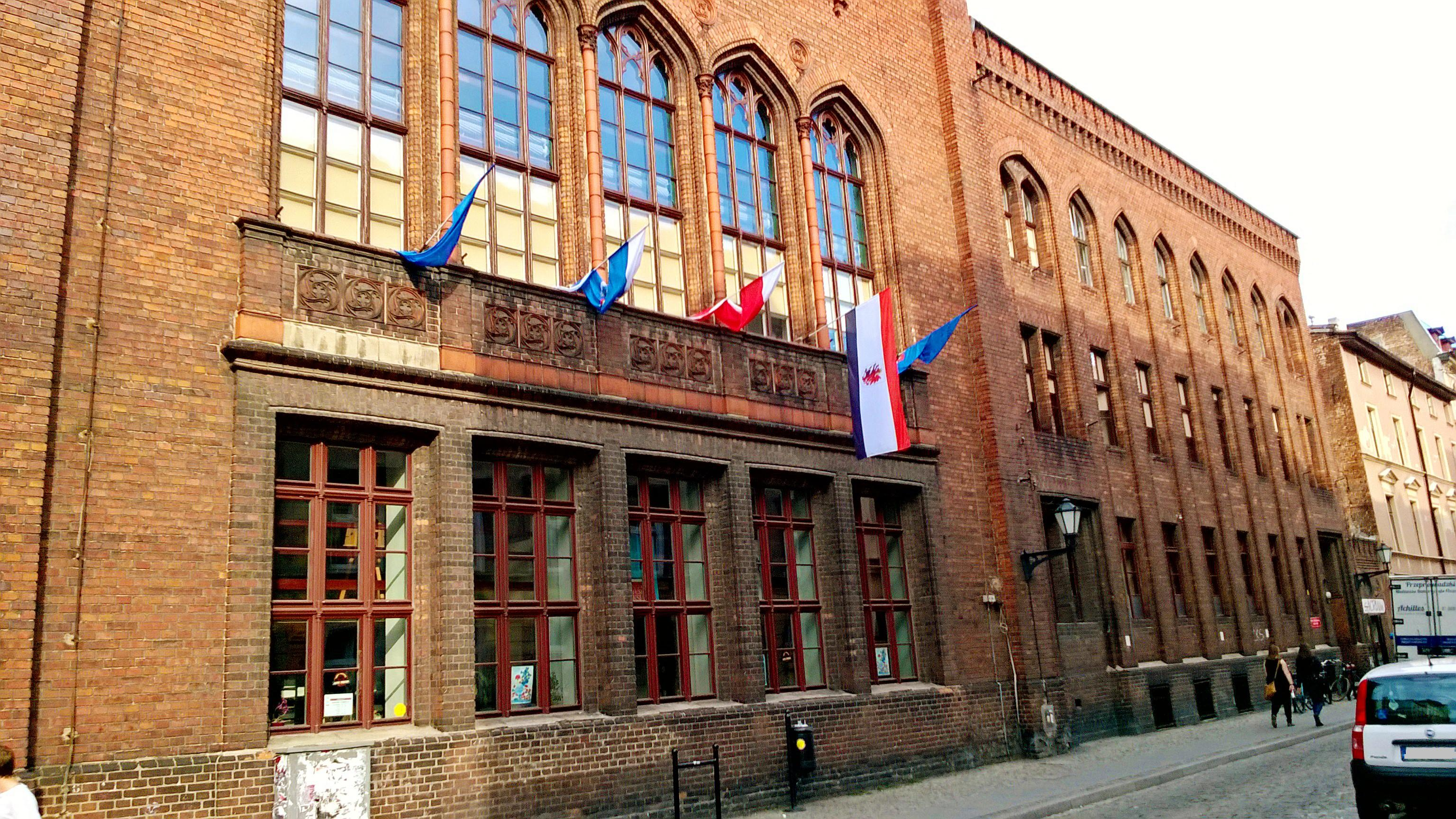 Wojewódzka Biblioteka Publiczna – filia nr 1 z oddziałem dla dzieci w Toruniu